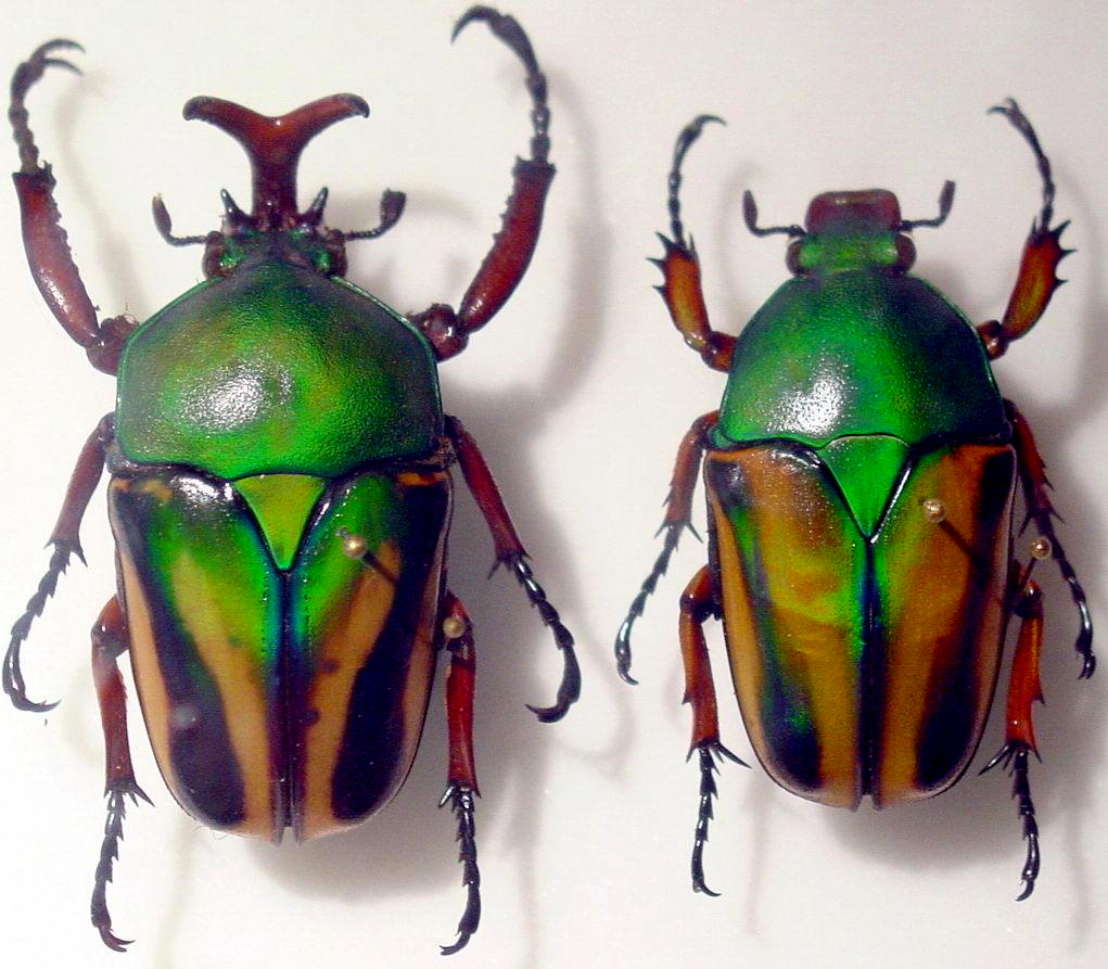 self made